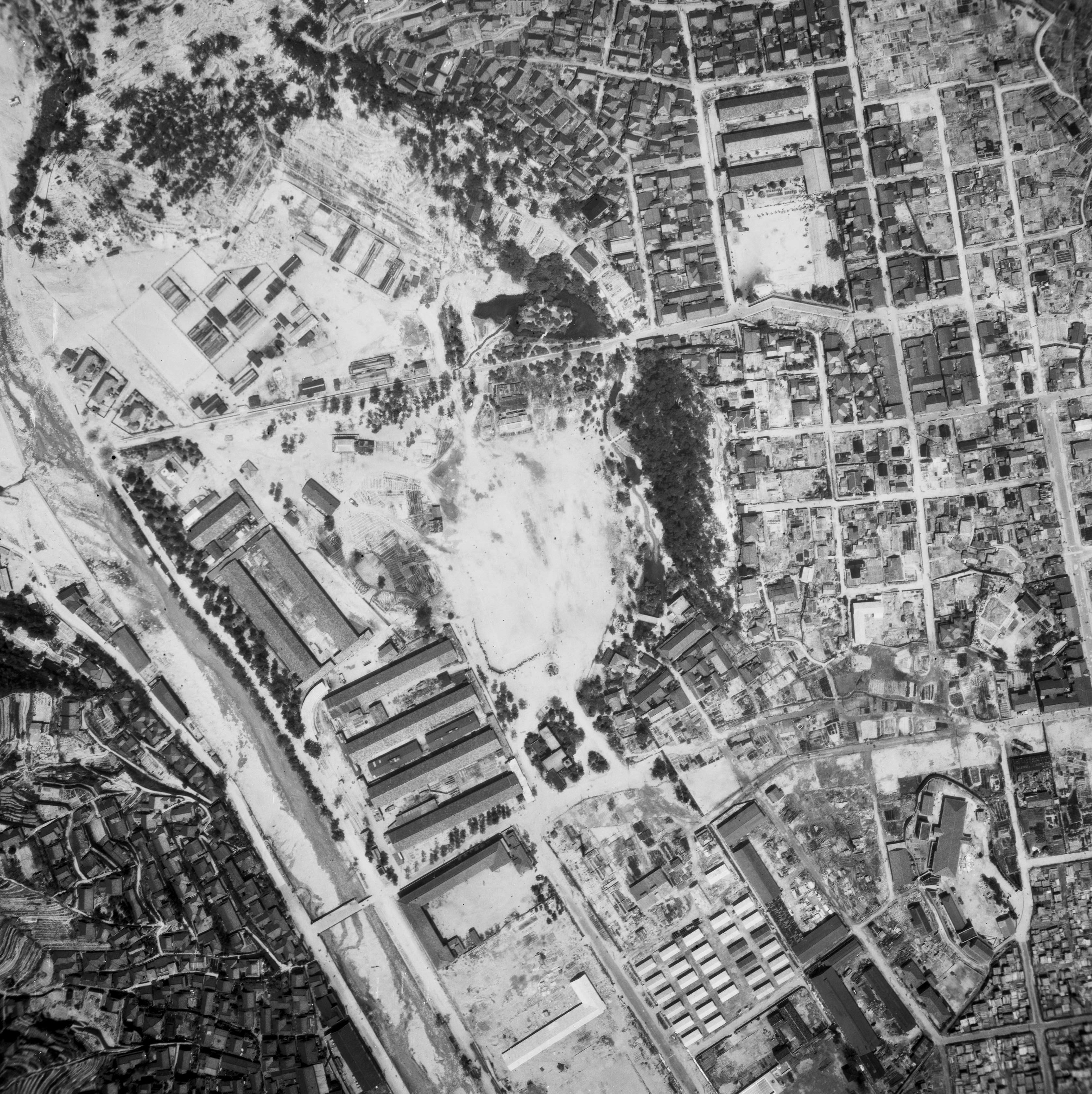 1947年広島県呉市二河公園